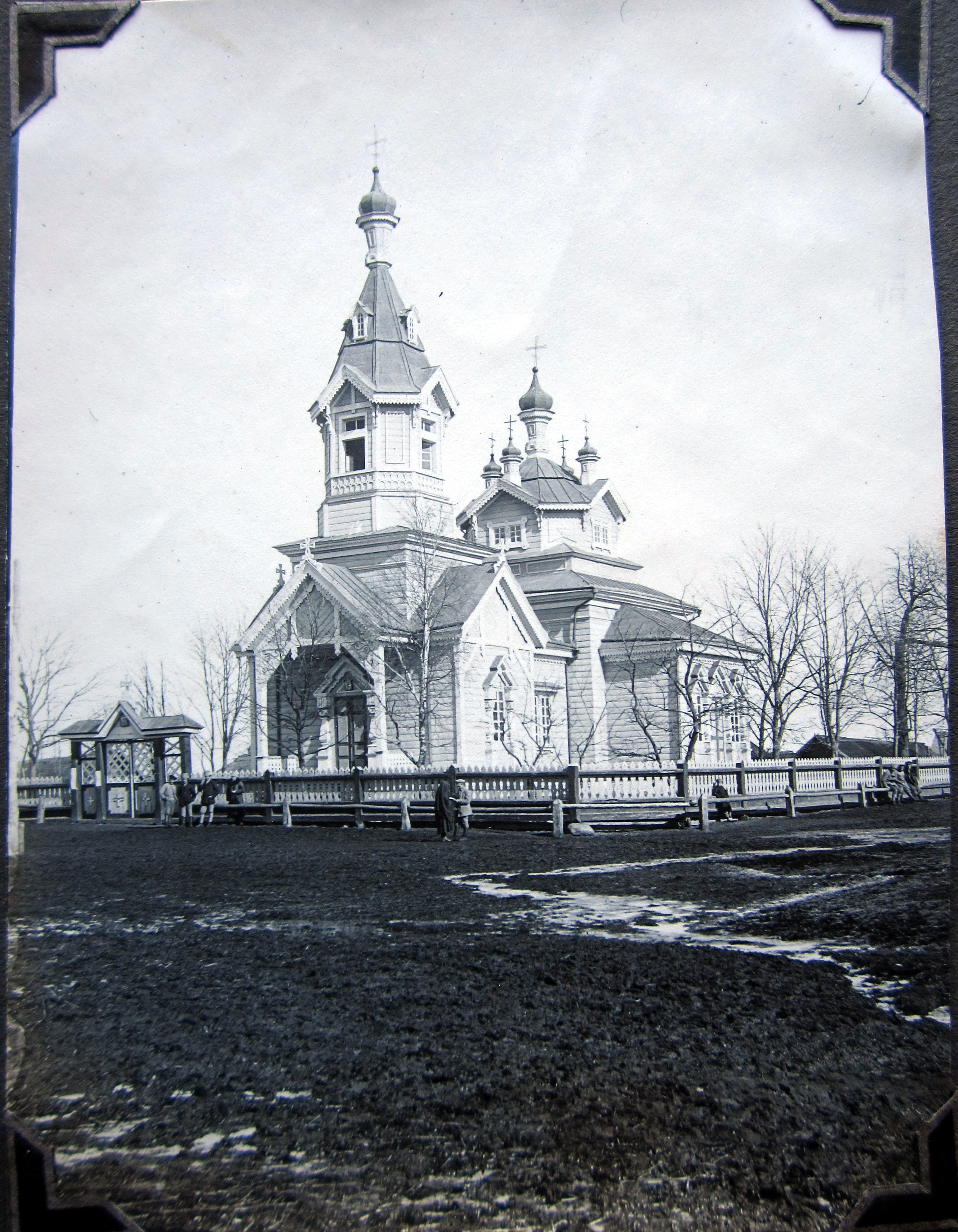 Беларуская (тарашкевіца): Вызна (Vyzna). Мікалаеўская царква-мураўёўка